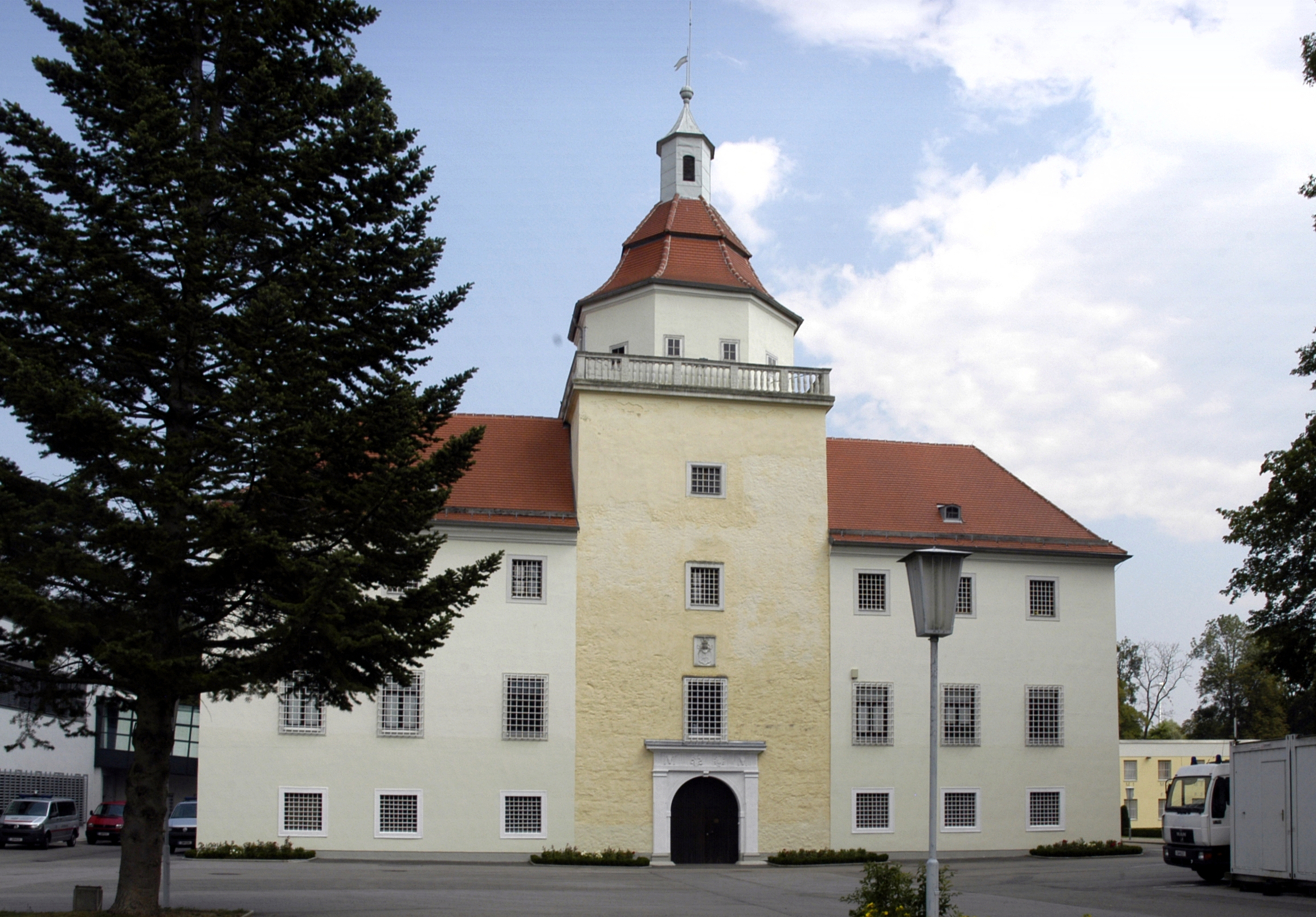 ehemaliges Schloss Sonnberg, Justizanstalt, Westfassade